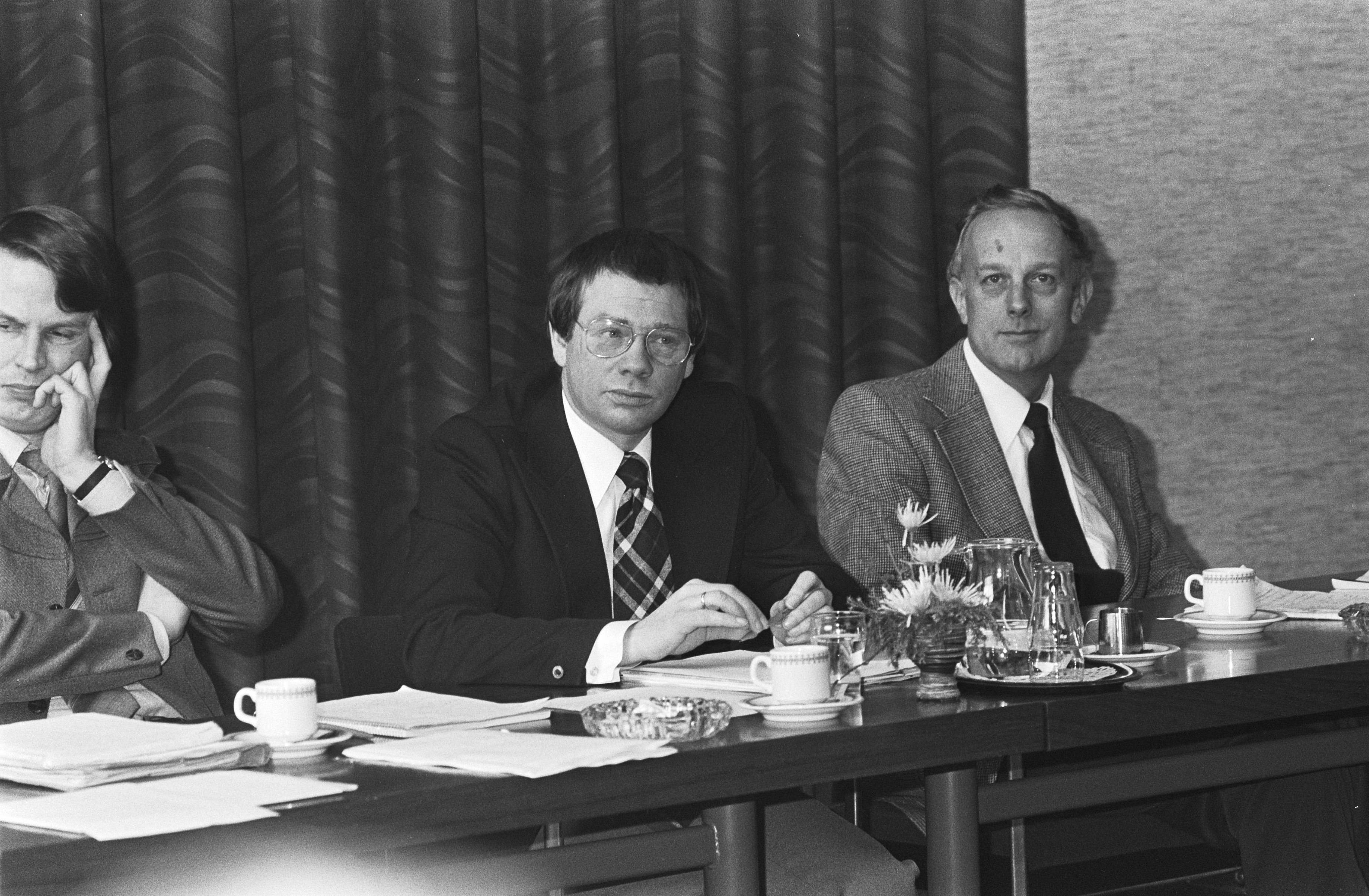 Collectie / Archief : Fotocollectie Anefo Reportage / Serie : CDA bestuur in de Lage Vuursche i.v.m. de vaststelling van de definitieve datum voor de fusie tussen KVP, CHU en ARP Beschrijving : Voorzitter Steenkamp (r) daarnaast dhr. S. Faber Datum : 17 maart 1979 Locatie : Lage Vuursche, Utrecht (provincie) Trefwoorden : besturen, bijeenkomsten, voorzitters Persoonsnaam : Faber, Sytze, Steenkamp, Piet Fotograaf : Dijk, Hans van / Anefo Auteursrechthebbende : Nationaal Archief Materiaalsoort : Negatief (zwart/wit) Nummer archiefinventaris : bekijk toegang 2.24.01.05 Bestanddeelnummer : 930-1732